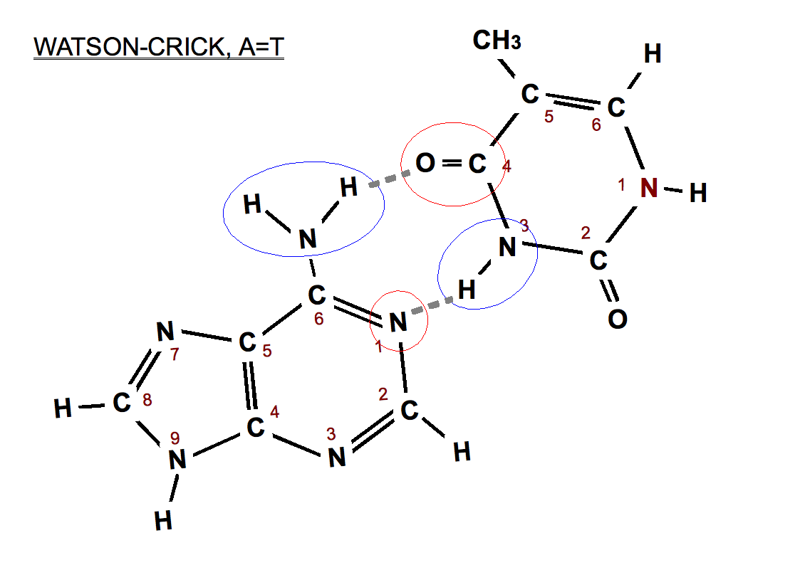 par de bases del tipo watson-crick entre bases nitrogenadas